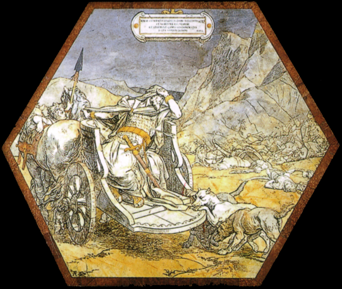 Pavimento di siena, esagono, morte di acab (alessandro franchi)